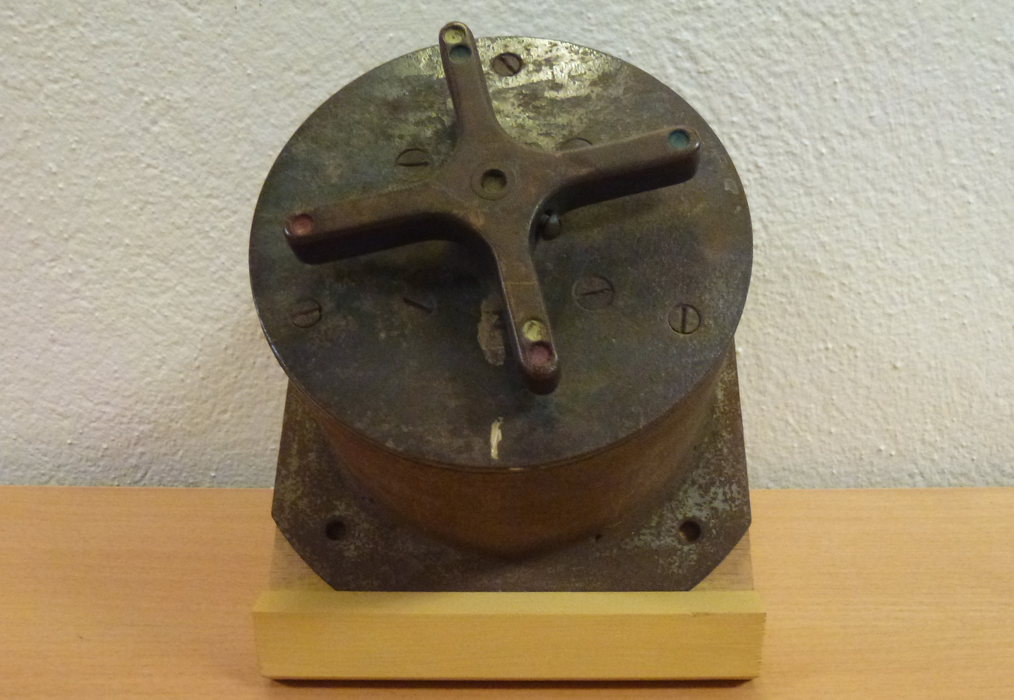 Signalstyrningsvred som satt i poliskuren, finns i samlingen på Stockholms trafikkontor